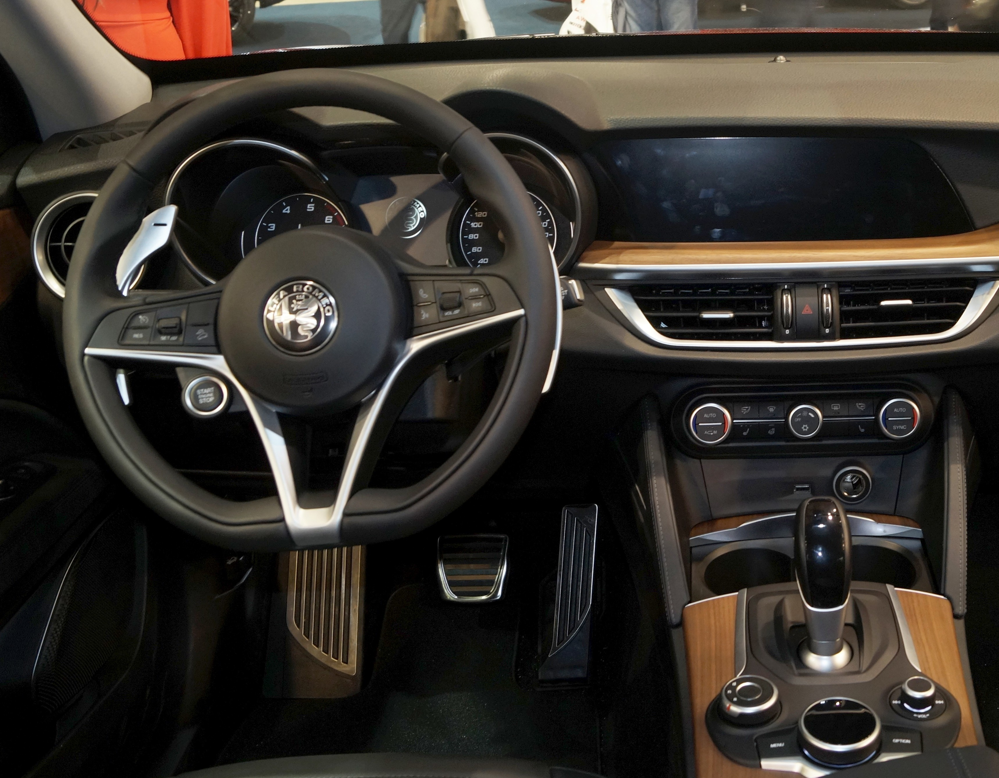 Wnętrze Alfy Romeo Stelvio na Motor Show Poznań 2017.